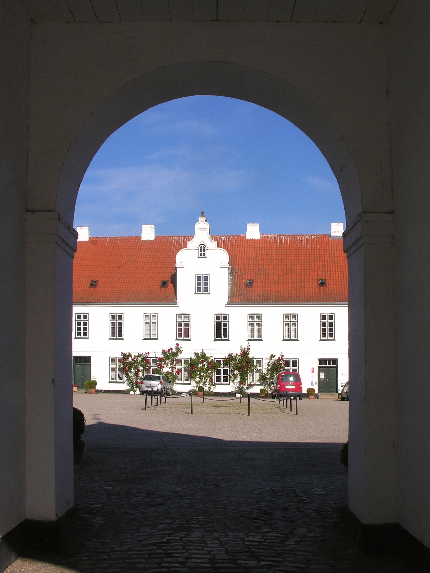 Kulturdenkmal 4.6 Wirtschaftshof vom Torhaus zum Kavalierhaus Schloss Glücksburg Schleswig-Holstein Foto 2012 Wolfgang Pehlemann Steinberg/Ostsee DSCN0209